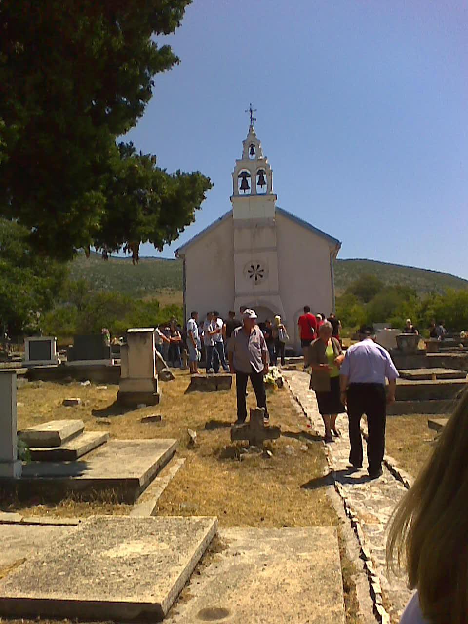 Volksfest am Ivanjdan in Baljci am 07.07.2011